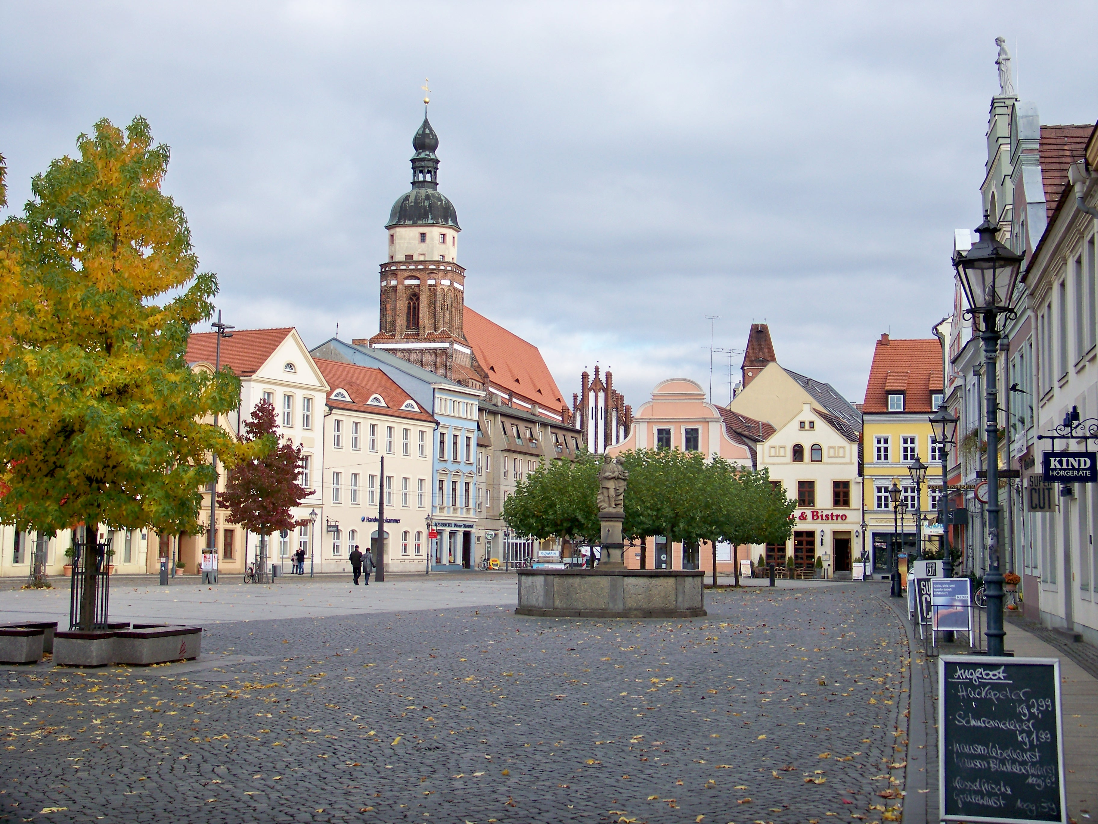 Altmarkt in Cottbus, im Hintergrund die Oberkirche St. Nikolai